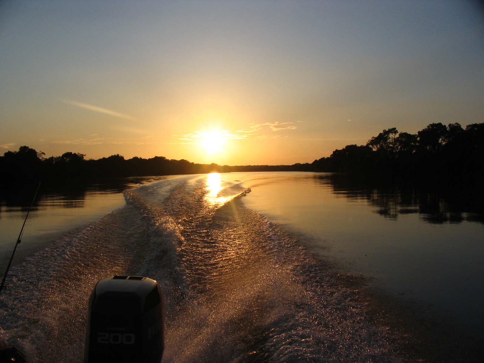 amanecer rio manacacias